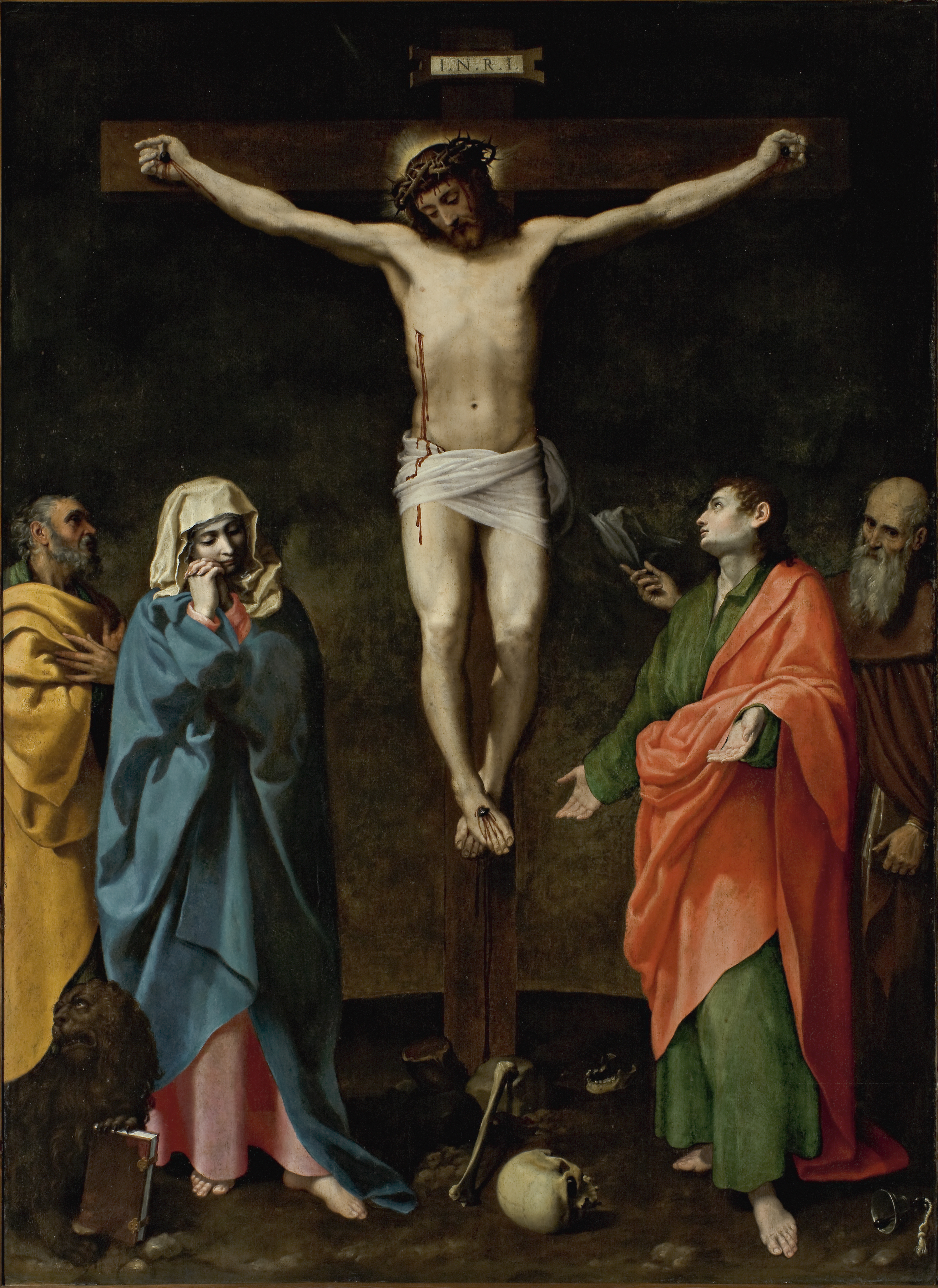 Calvario, con la Virgen, San Juan Evangelista, San Marcos y San Antonio Abad